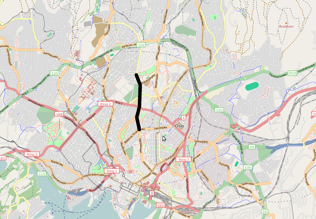 Uelands gate (det tradisjonelle skillet mellom Oslos østkant og vestkant) markert i sort